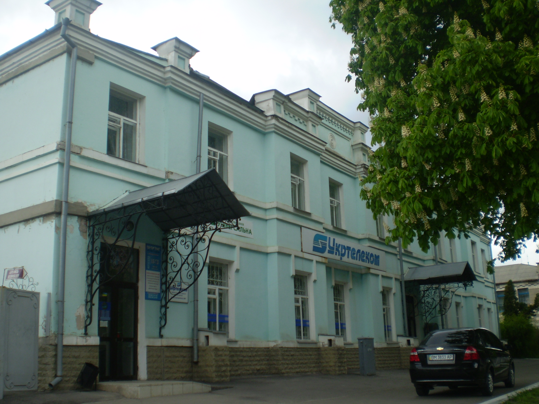 Будівля зведена у 1820 році у стилі класицизму